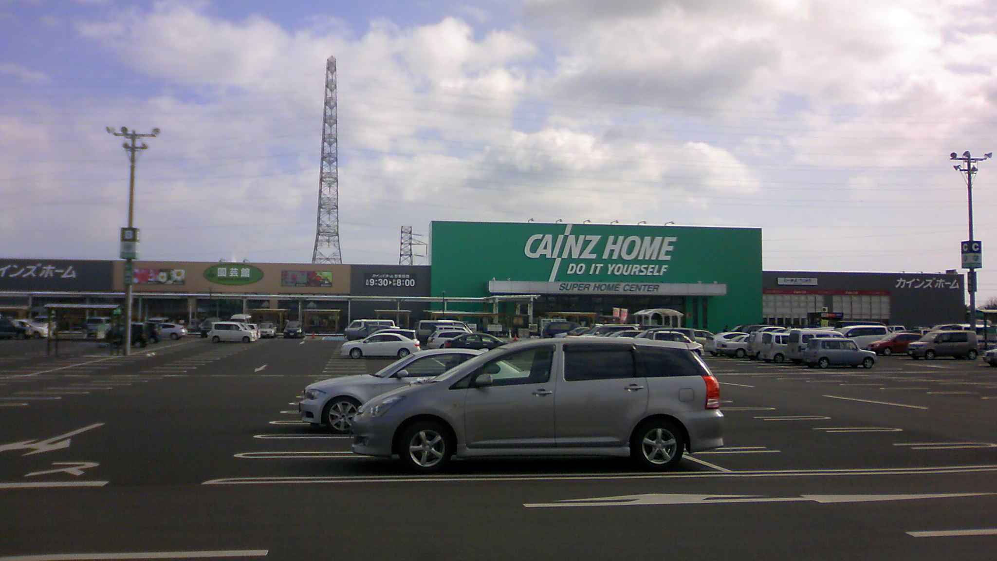 カインズホーム仙台港店